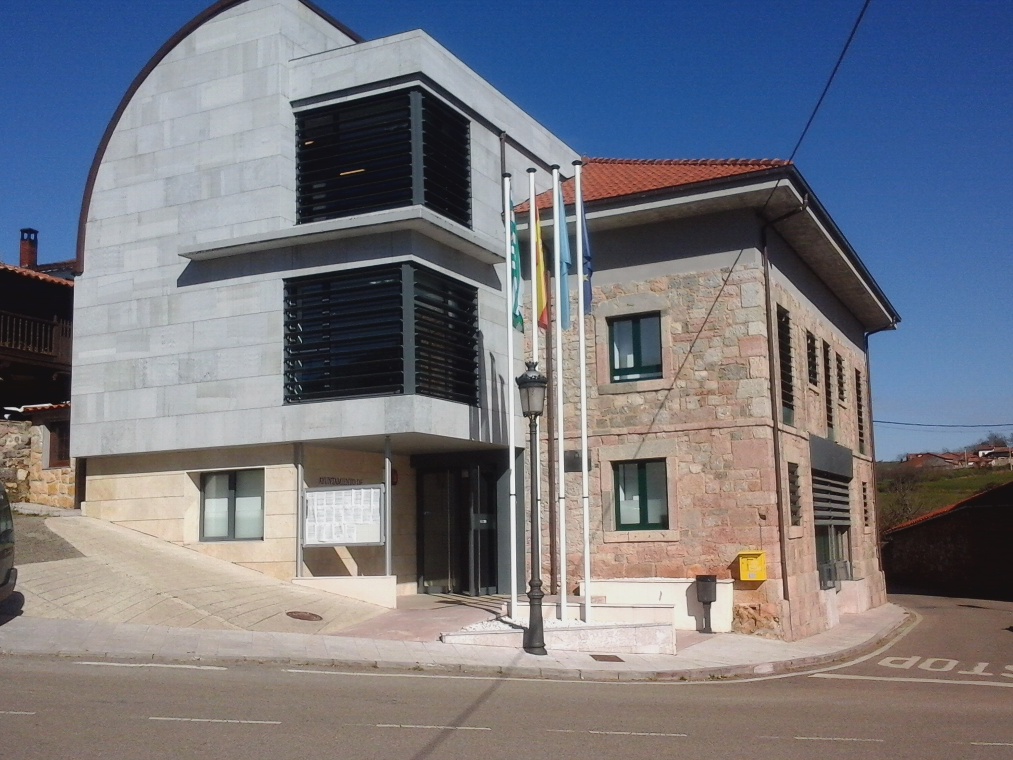 Ayuntamiento Las Regueras